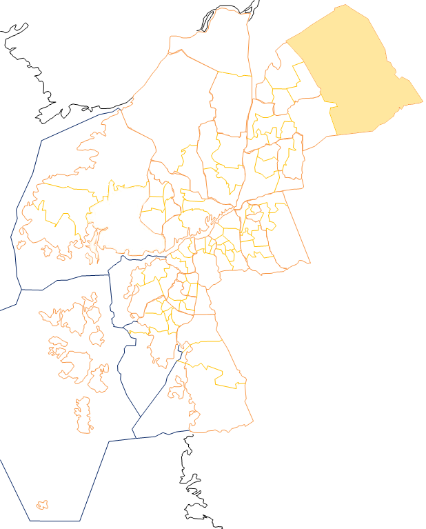 Karta som visar primärområdes belägenhet i Göteborg